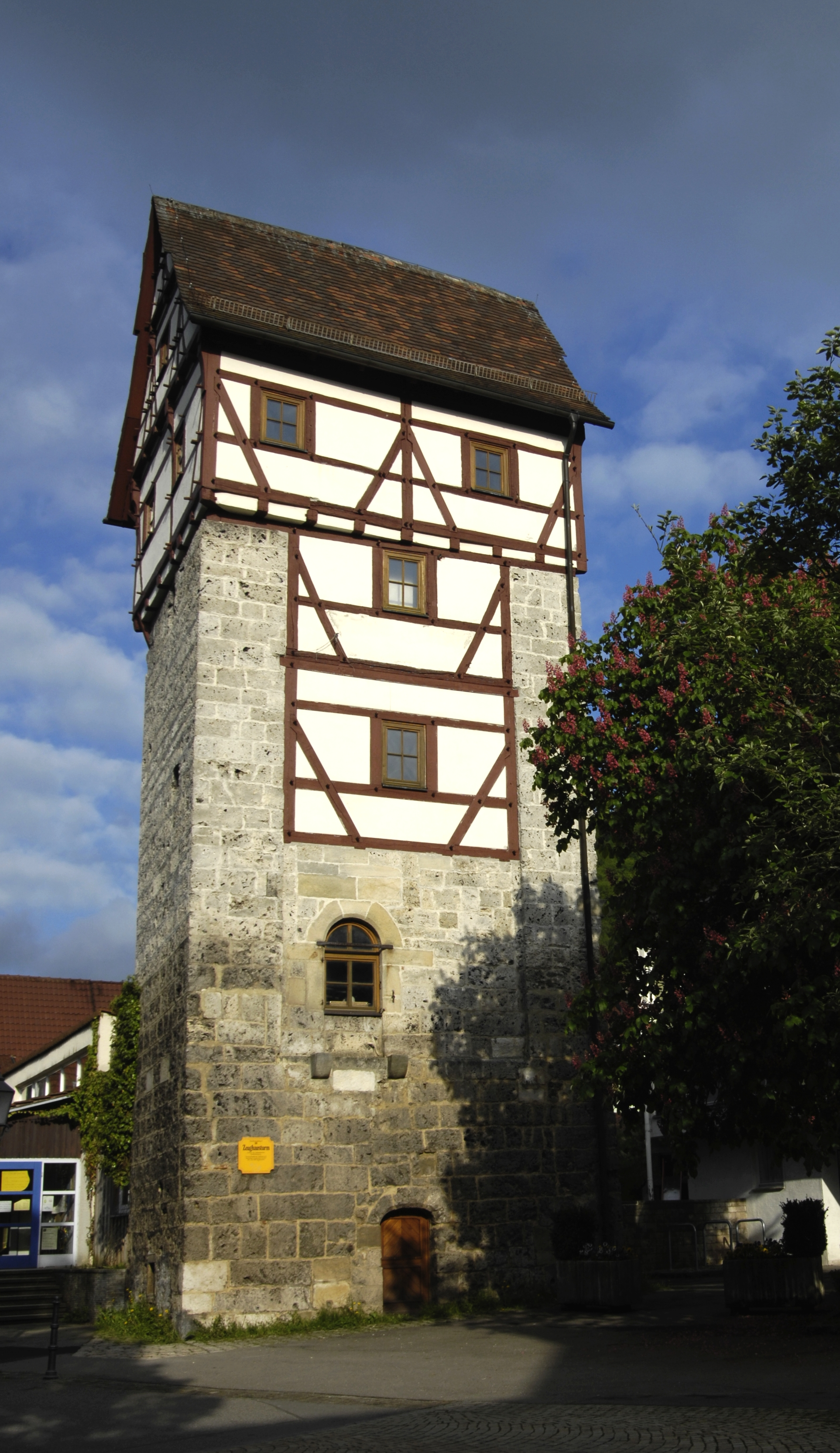 Bad Urach, Schwäbische Alb, der so genannte Zeughausturm